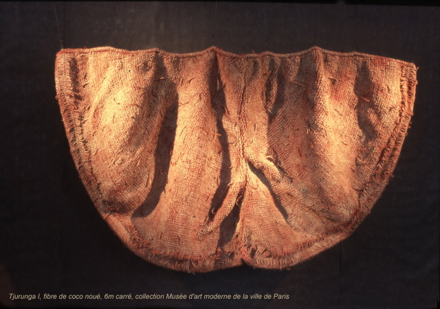 Tjurunga I, fibre de coco noué, 6m carré, collection Musée d'art moderne de la ville de Paris